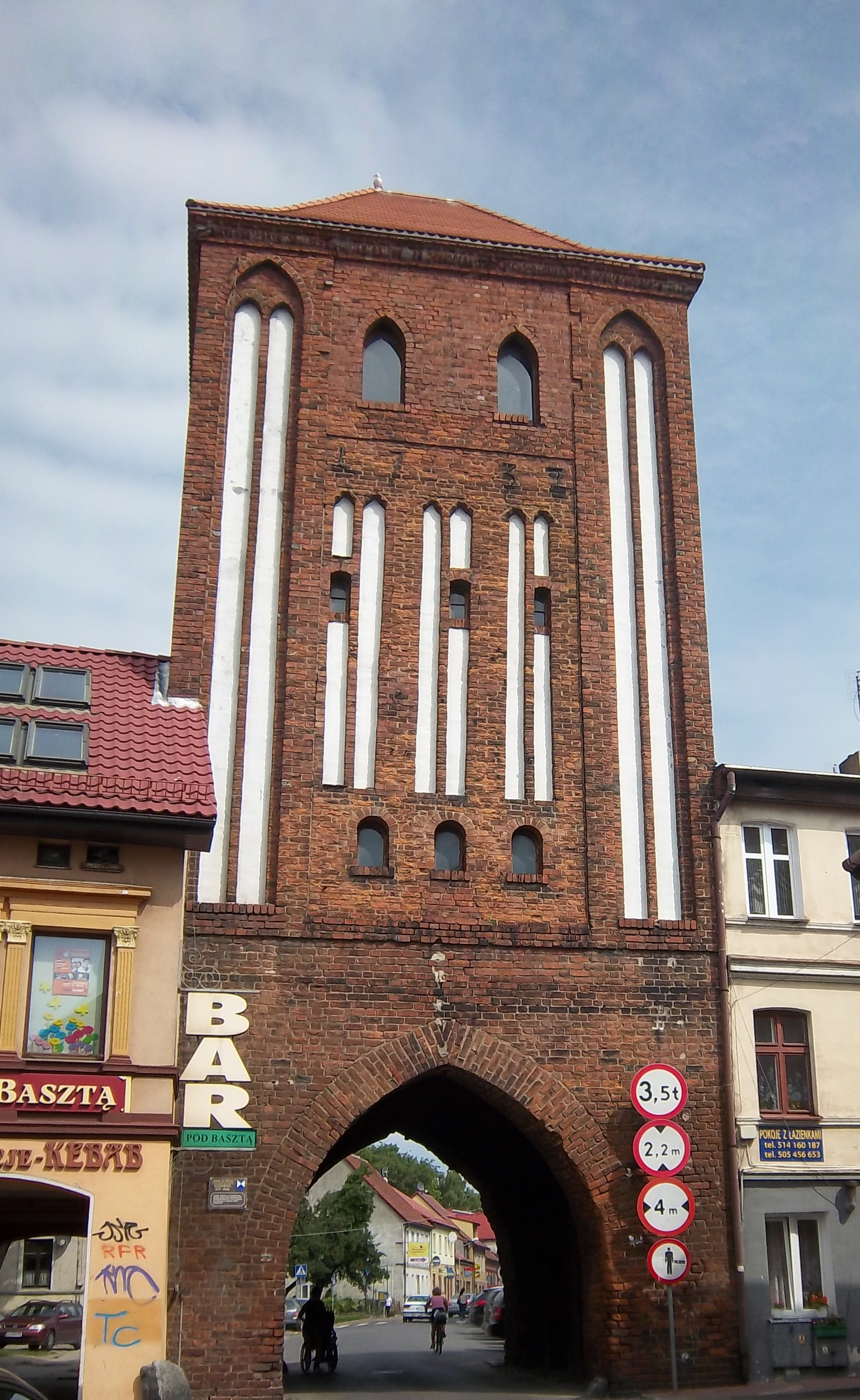 Darłowo, ul. Powstańców Warszawskich - Brama Wysoka (Kamienna) w zespole murów miejskich (zabytek nr 93 z 25.05.1955)